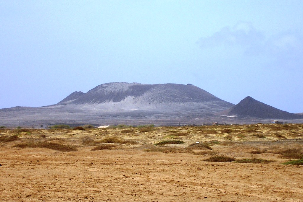 "Viana" extinct volcano at São Vicente island, Cape Verde